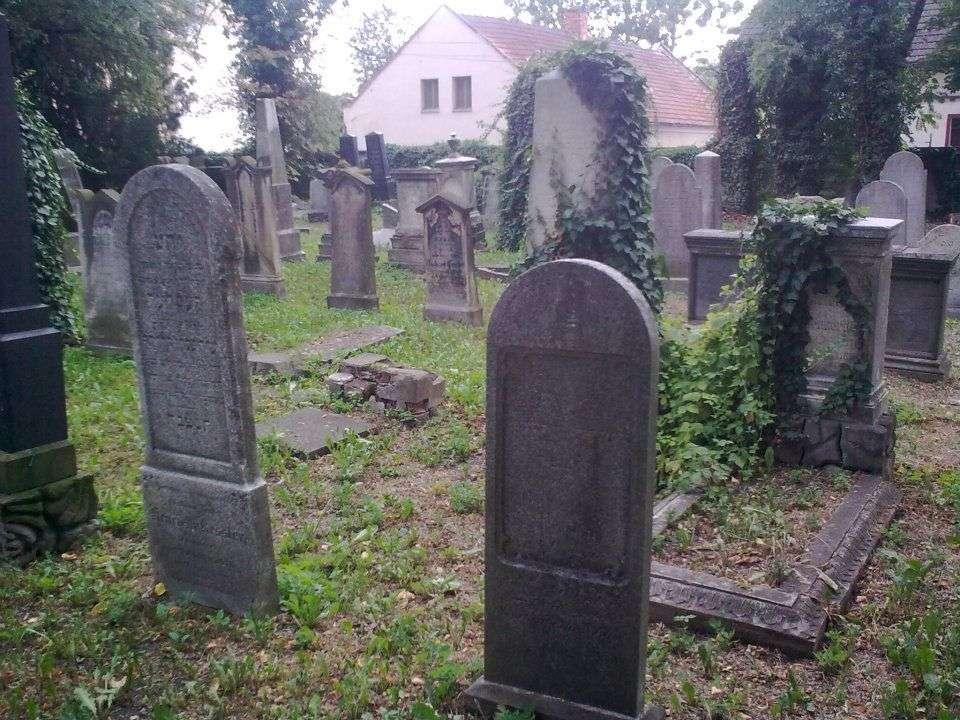 Macewy na cmentarzu żydowskim w Opolu